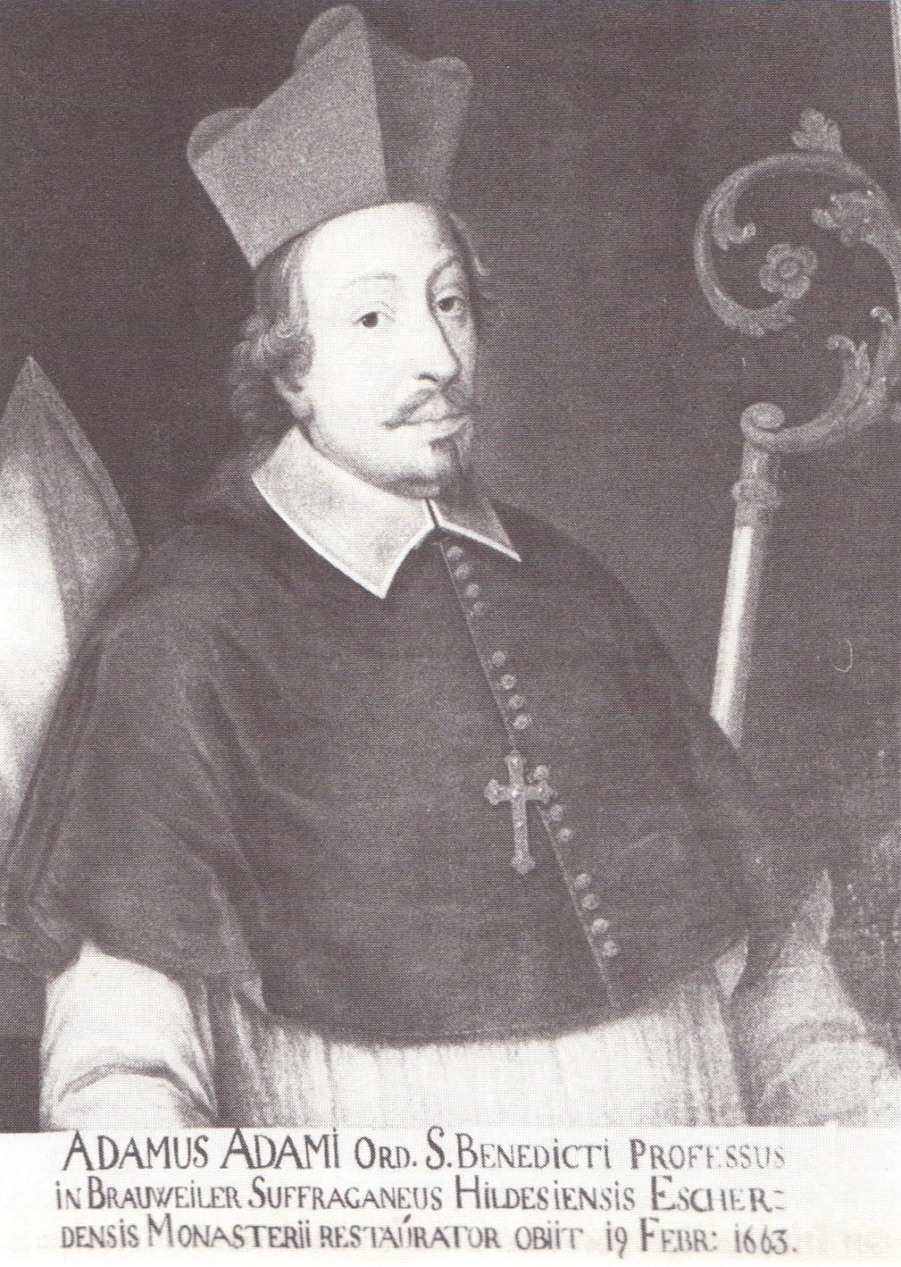 Adamus Adami OSB, Weihbischof in Hildesheim 1652-1663; Gemälde in der Dombibliothek Hildesheim